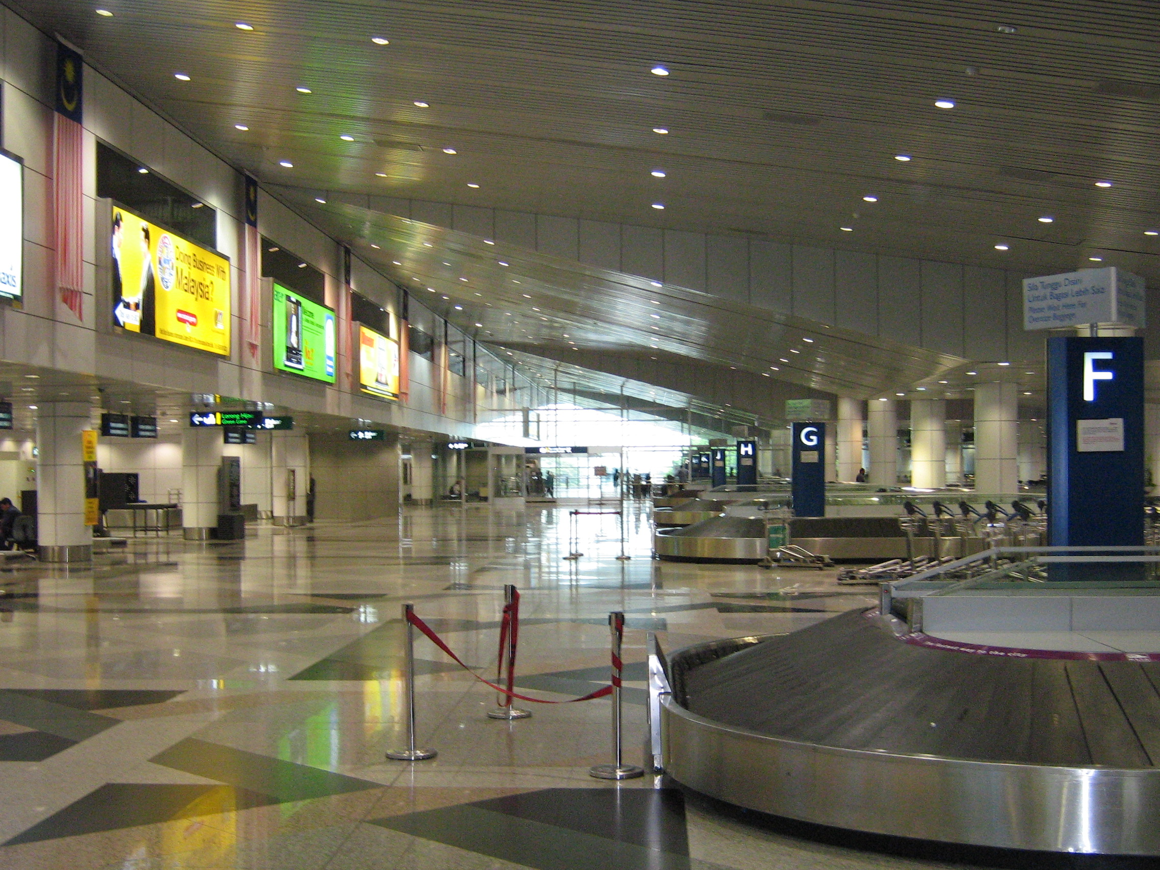 Gepäckausgabe in KLIA